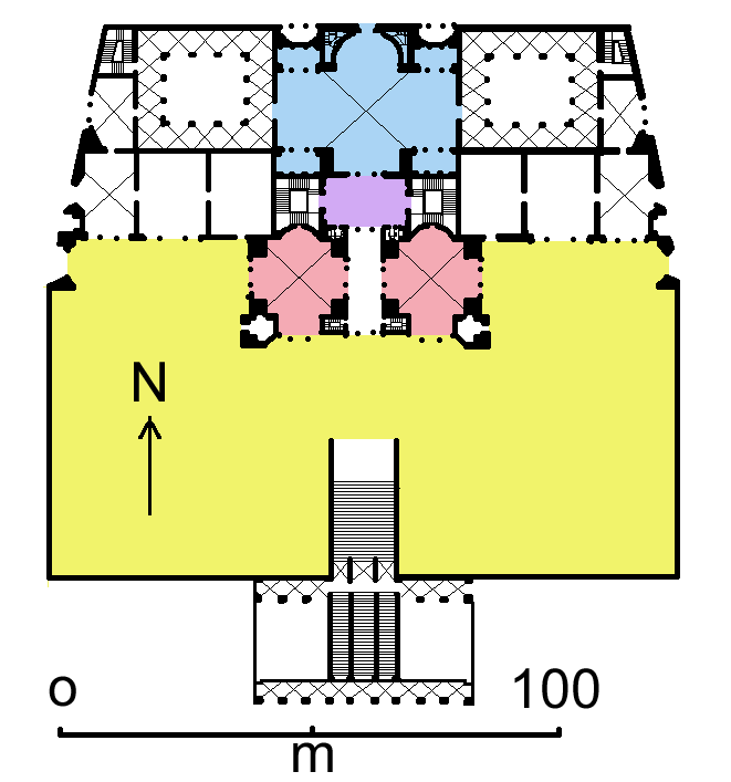 terme di Tito, Roma, mappa: in blu Frigidarium, in viola Tediparium, in rosso Calidarium, in giallo Palestra